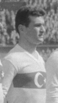 Kadri Aytaç